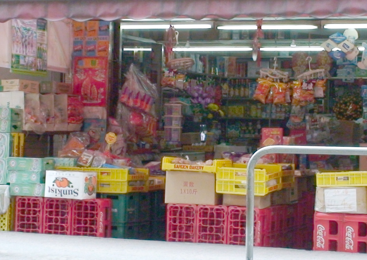 A Hong Kong style variety shop (雜貨鋪) Hong Kong